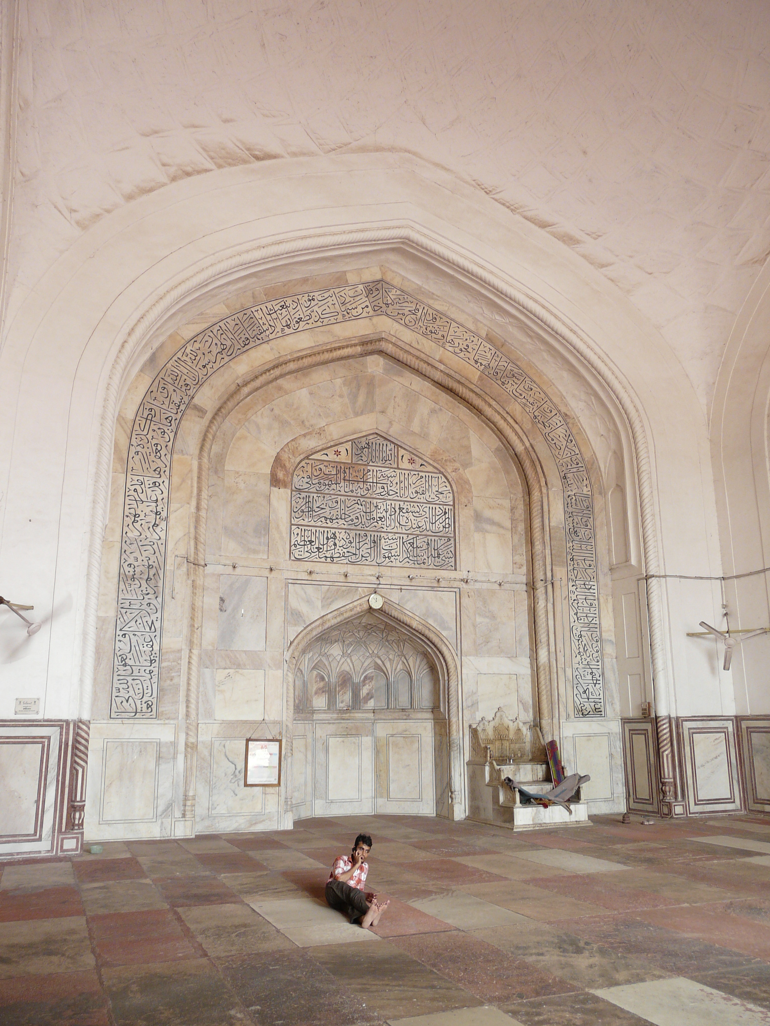 Mehrab, Agra Jama Masjid Jama Masjid, Agra, India